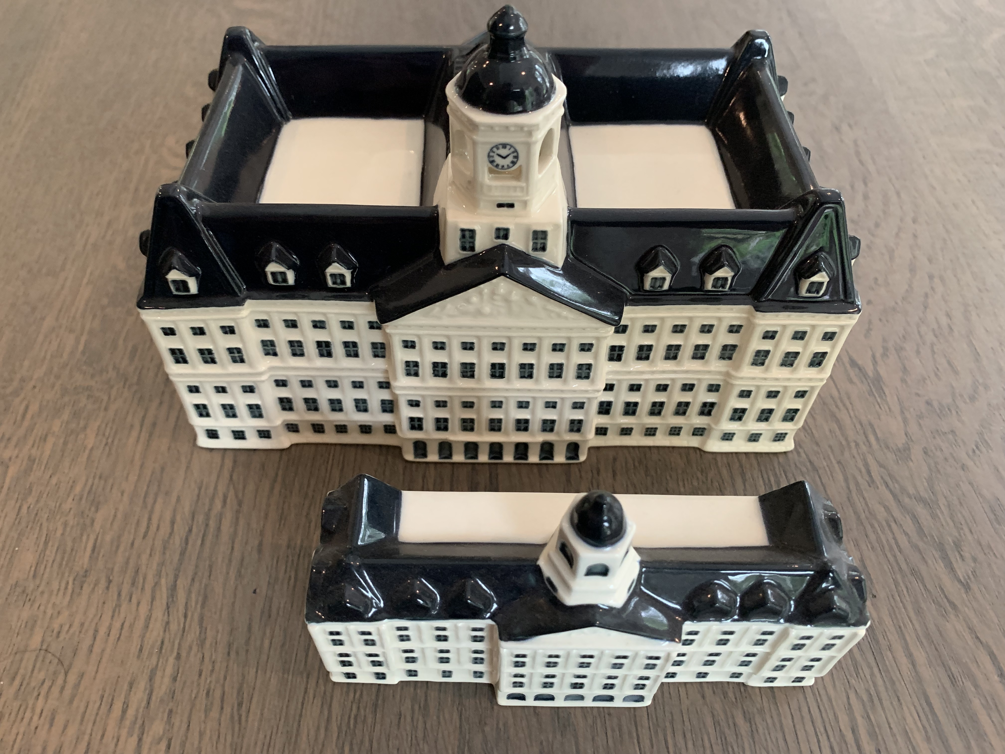 Klm huisje paleis op de dam klein en groot